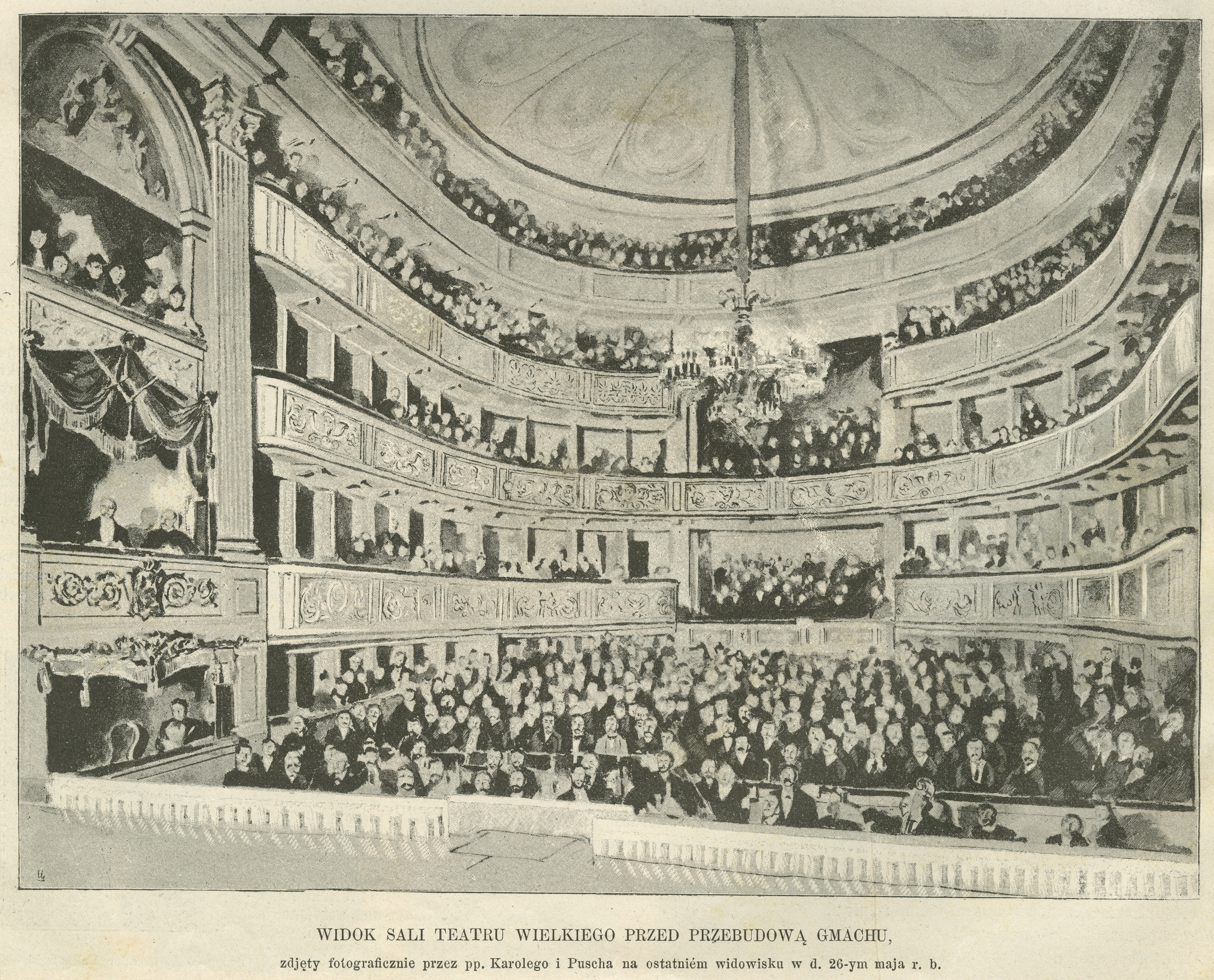 Widok sali Teatru Wielkiego przed przebudową gmachu